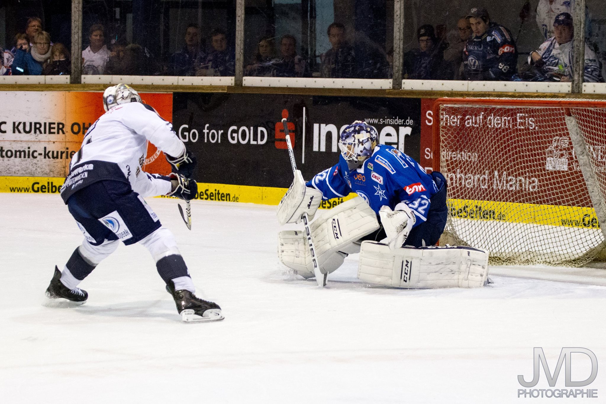 Kai Kristian im Tor der Kassel Huskies 2014/15 im Spiel gegen den SC Riessersee am 30.12.2014 bei einem Penalty Schuss.